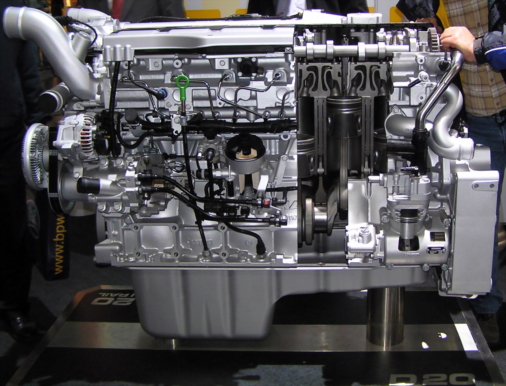 MAN Sechszylinder Dieselmotor, Typ D2066LF.